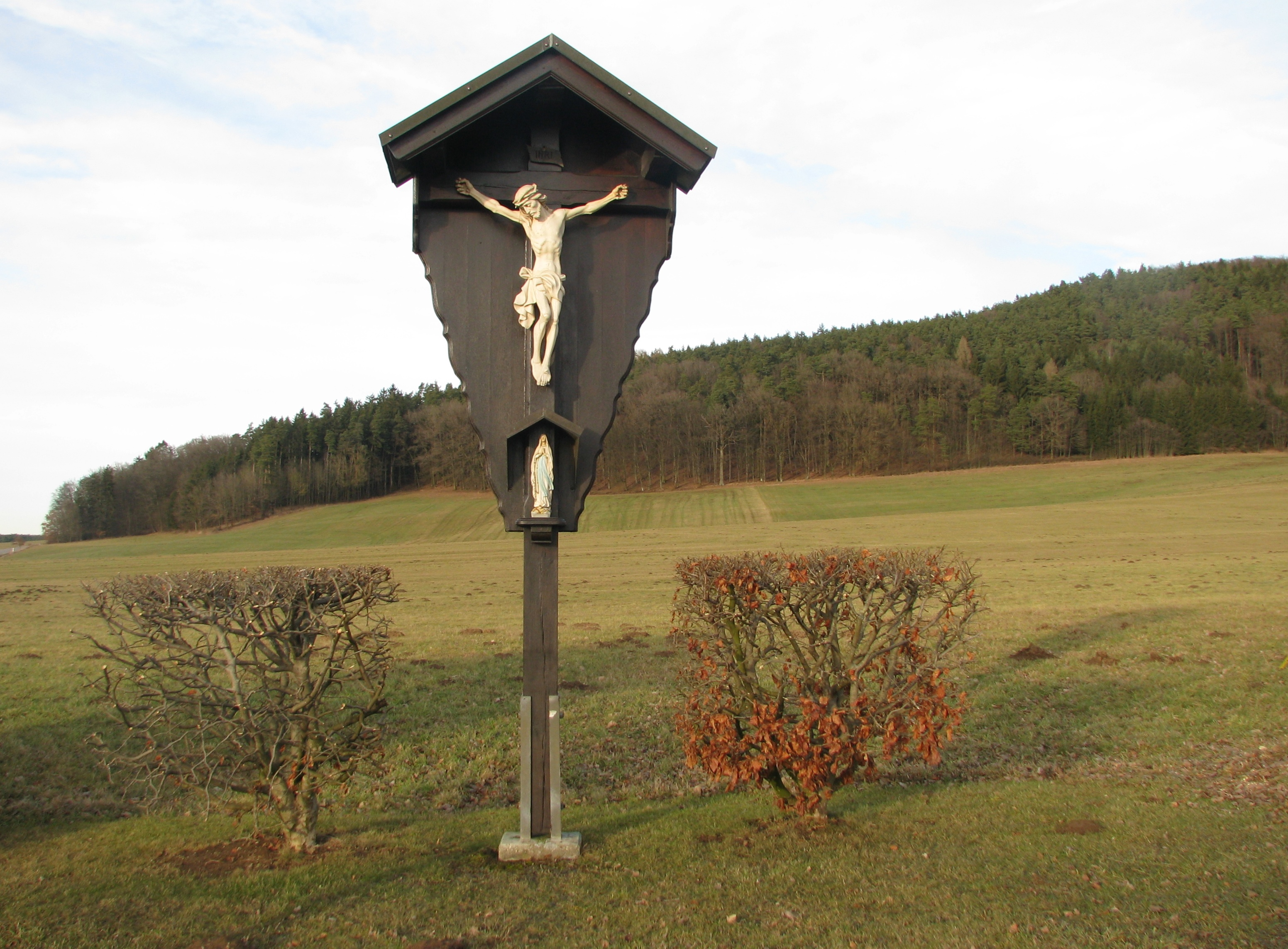 Wegkreuz bei Wangen, Ortsteil vom Mühlhausen im Landkreis Neumarkt in der Oberpfalz